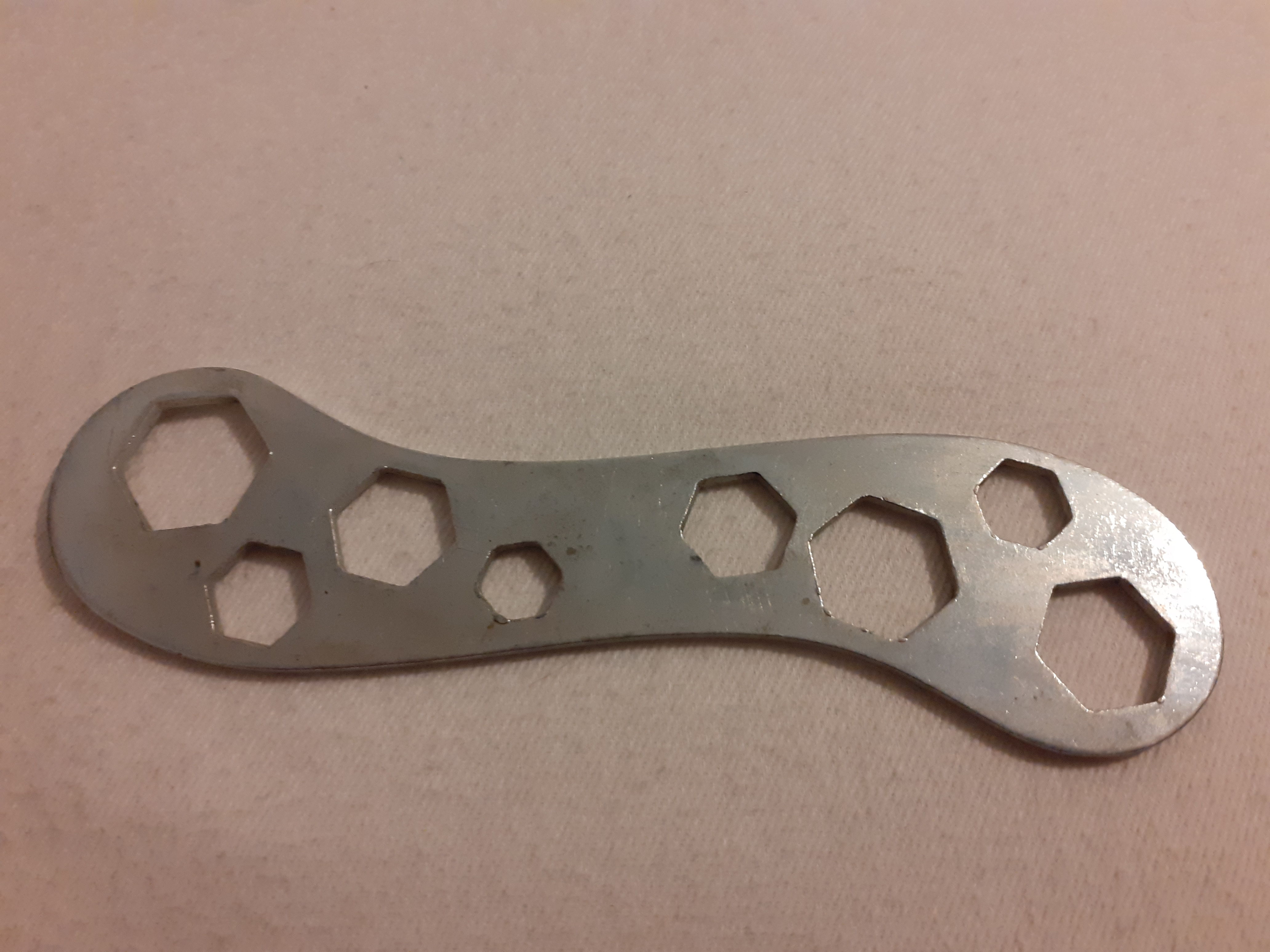 Bild eines gebrauchten Mehrfach-Schraubenschlüssel